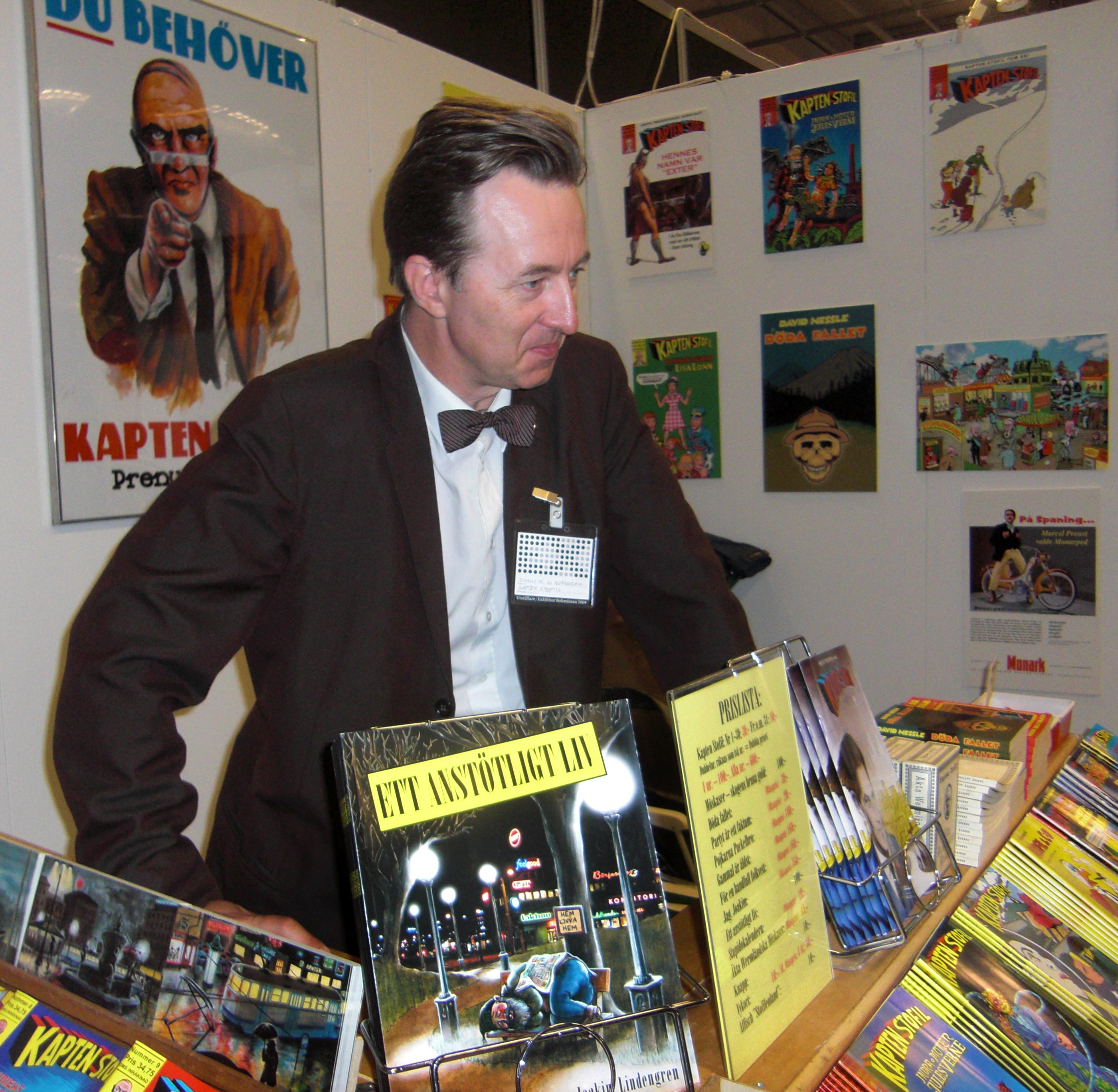 Joakim Lindengren i Kapten Stofils monter på Bokmässan 2009-09-24.